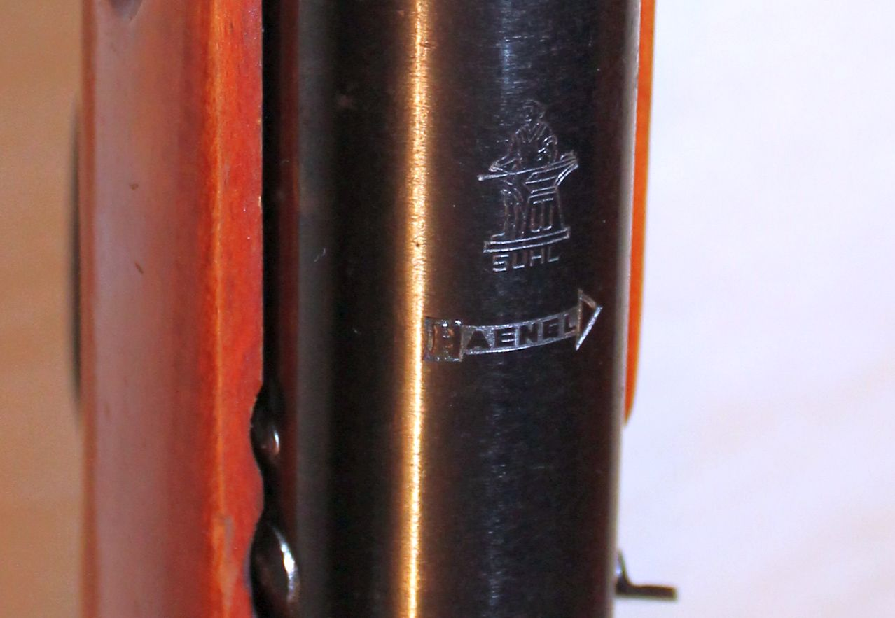 Haenel-Luftgewehr III-284 von 1962. Haenel-Pfeil und Suhler Waffenschmied.